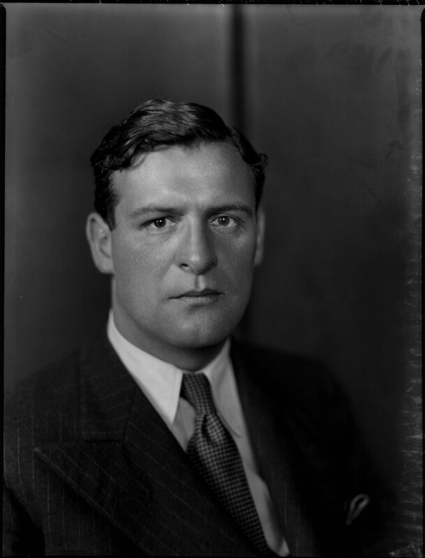 Ken Lindsay